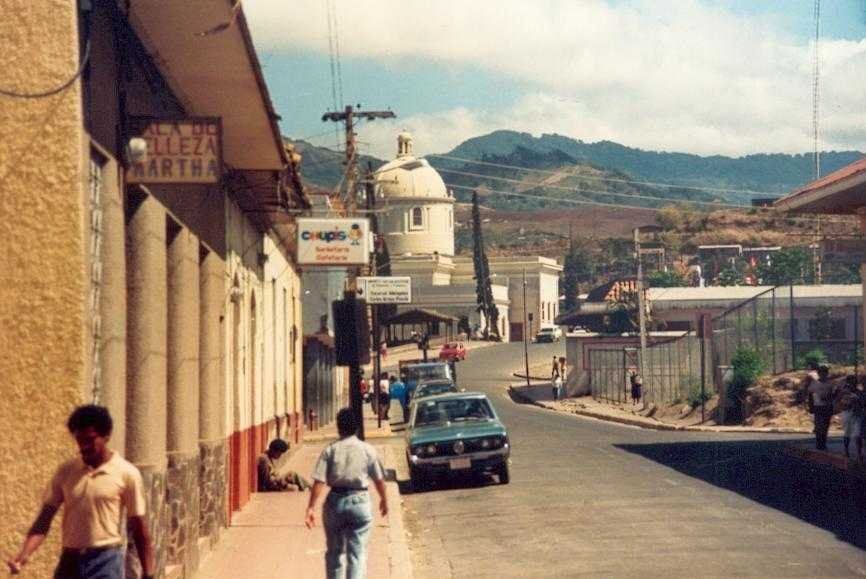 Matagalpa Nicaragua América Central (1988).